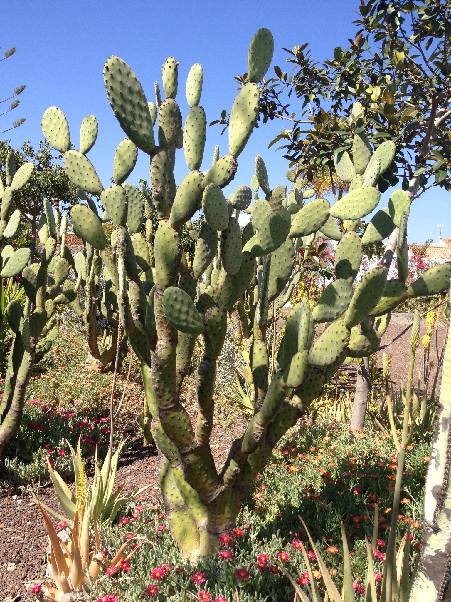 Opuntia tomentosa podada en forma de arbolillo